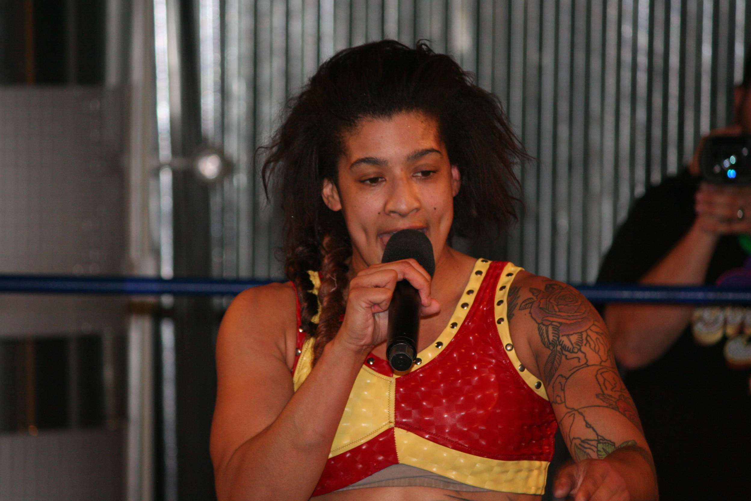 La catcheuse Nicole Savoy en 2016.